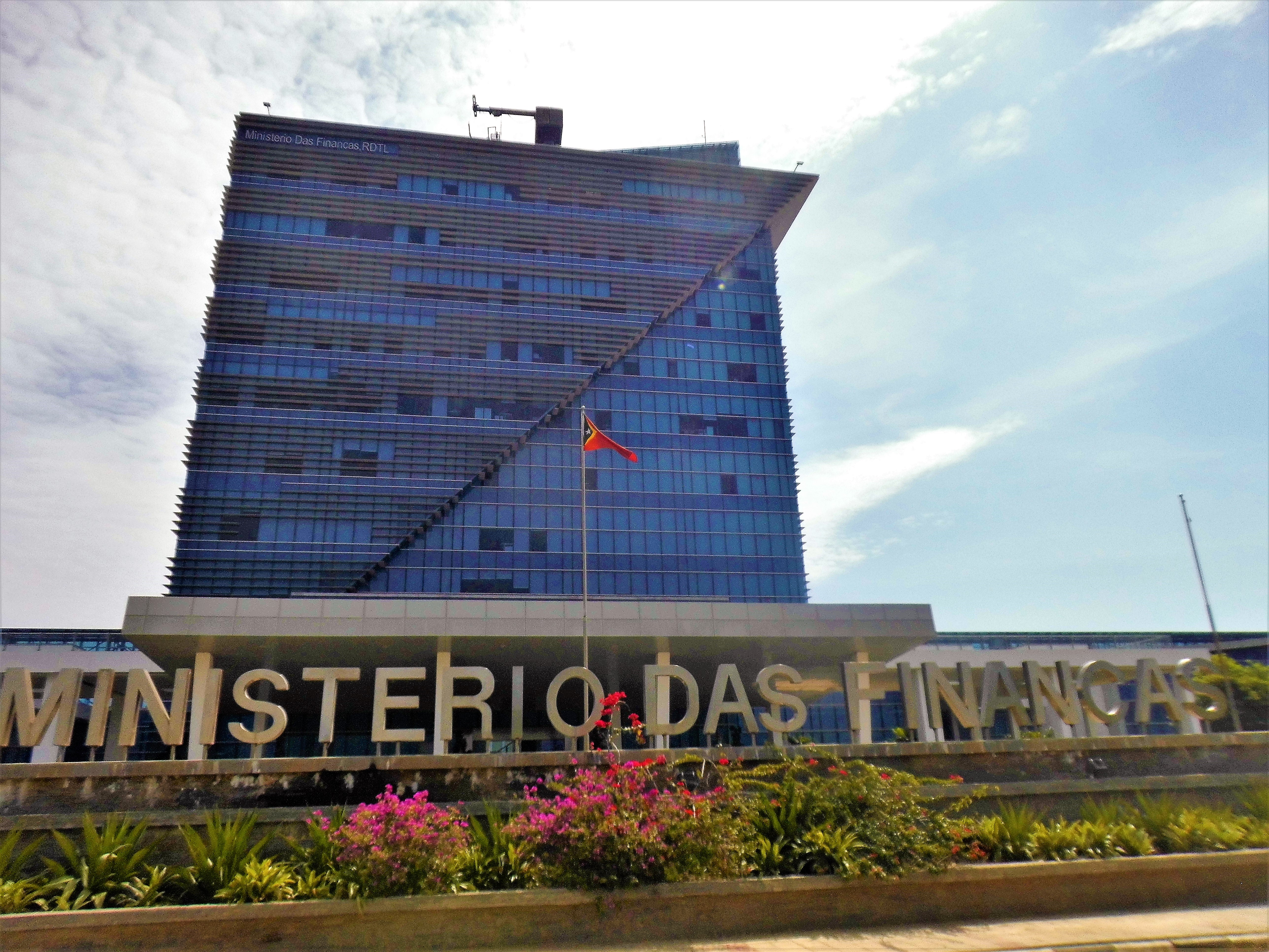 Finanzministerium, Dili, Osttimor